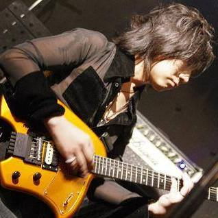 いたちもーど公式画像